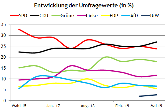 BremenWahl Umfragen 2019